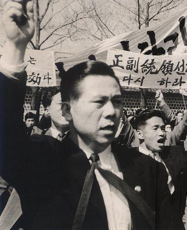 Sosuk Lee Chul-seung in 1960